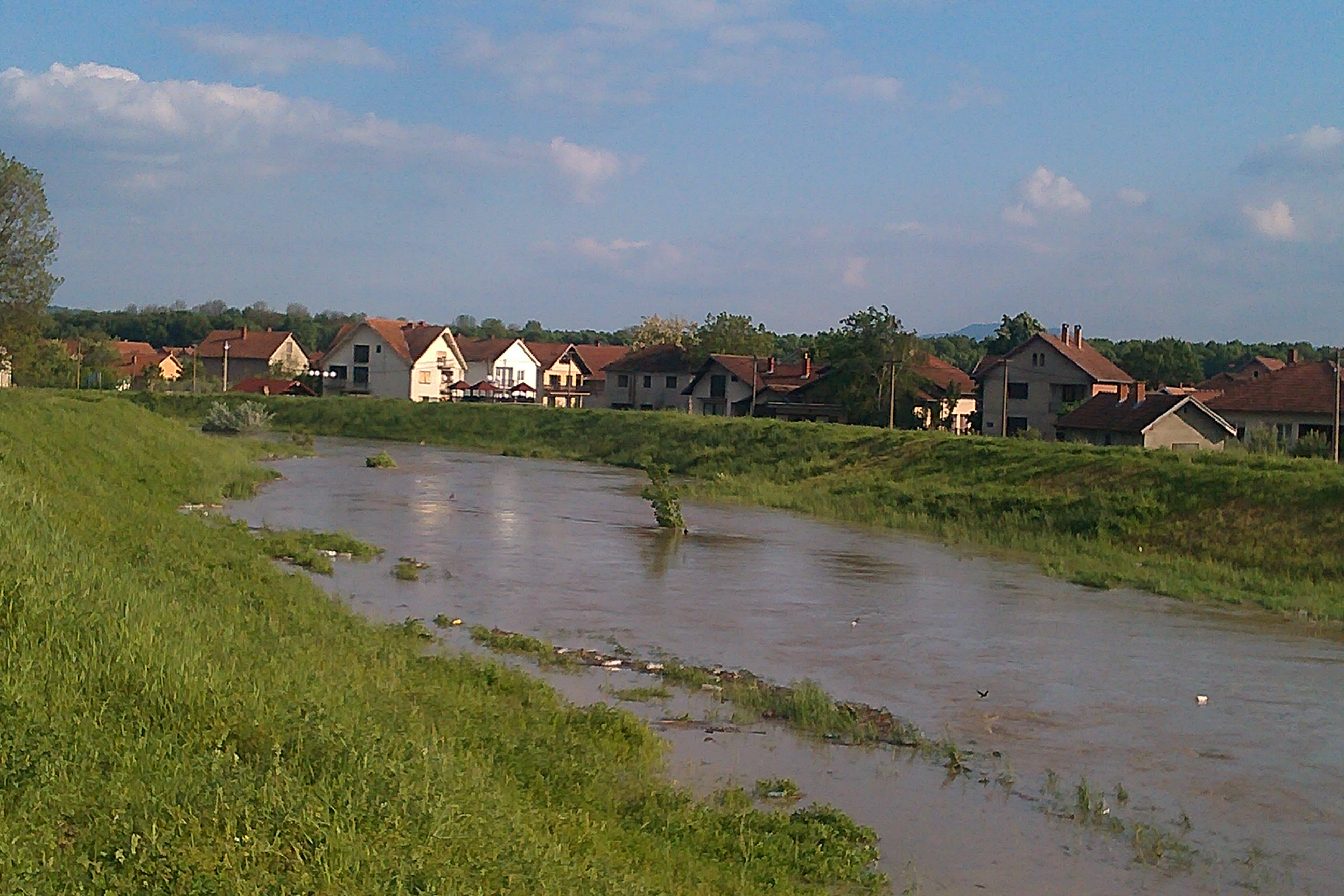 Srpski (latinica): Povećan vodostaj reke